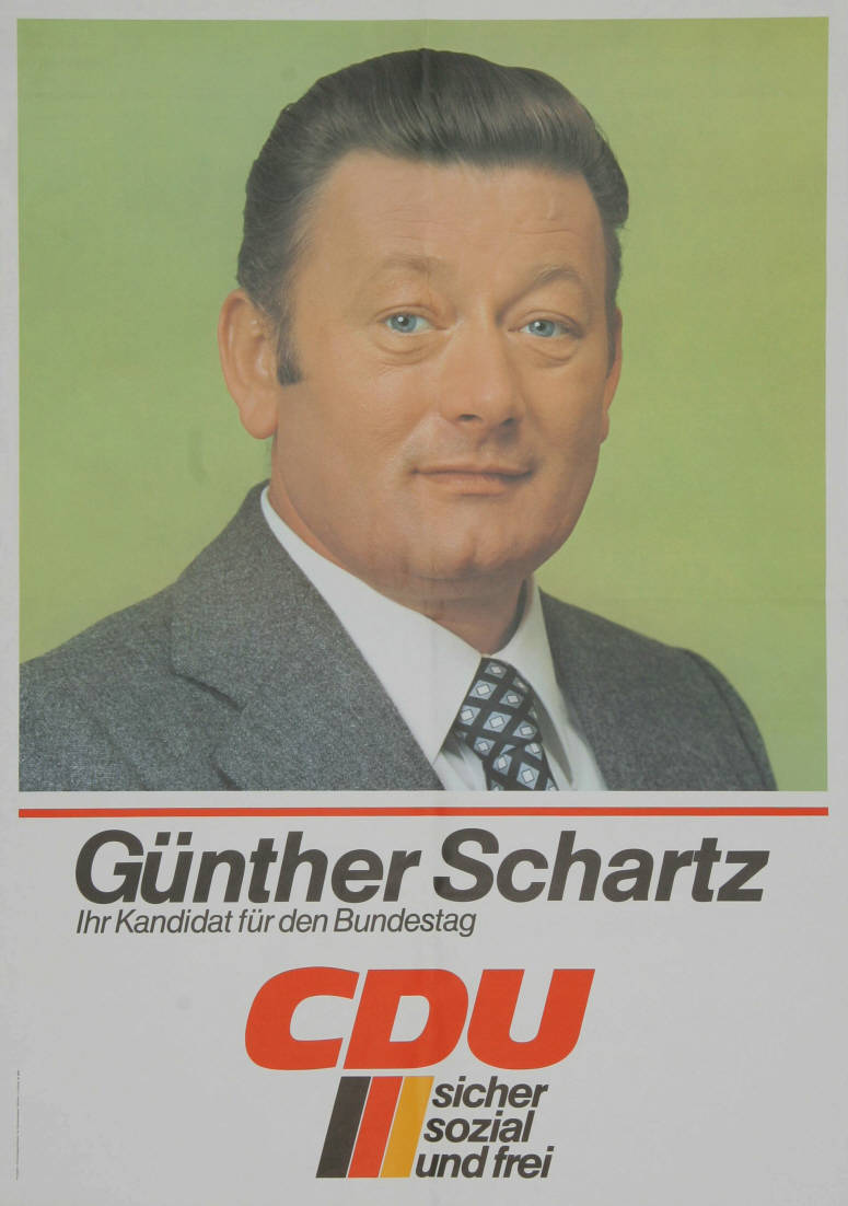 Günther Schartz Ihr Kandidat für den Bundestag CDU sicher sozial und freiAbbildung:PorträtfotoPlakatart:Kandidaten-/Personenplakat mit PorträtAuftraggeber:CDU-Bundesgeschäftsstelle, Abt. Öffentlichkeitsarbeit, BonnObjekt-Signatur:10-001: 2151Bestand:Plakate zu Bundestagswahlen (10-001)GliederungBestand10-18:Plakate zu Bundestagswahlen (10-001) » Die 8. Bundestagswahl am 3. Oktober 1976 » CDU » Mit PorträtfotoLizenz:KAS/ACDP 10-001: 2151 CC-BY-SA 3.0 DE